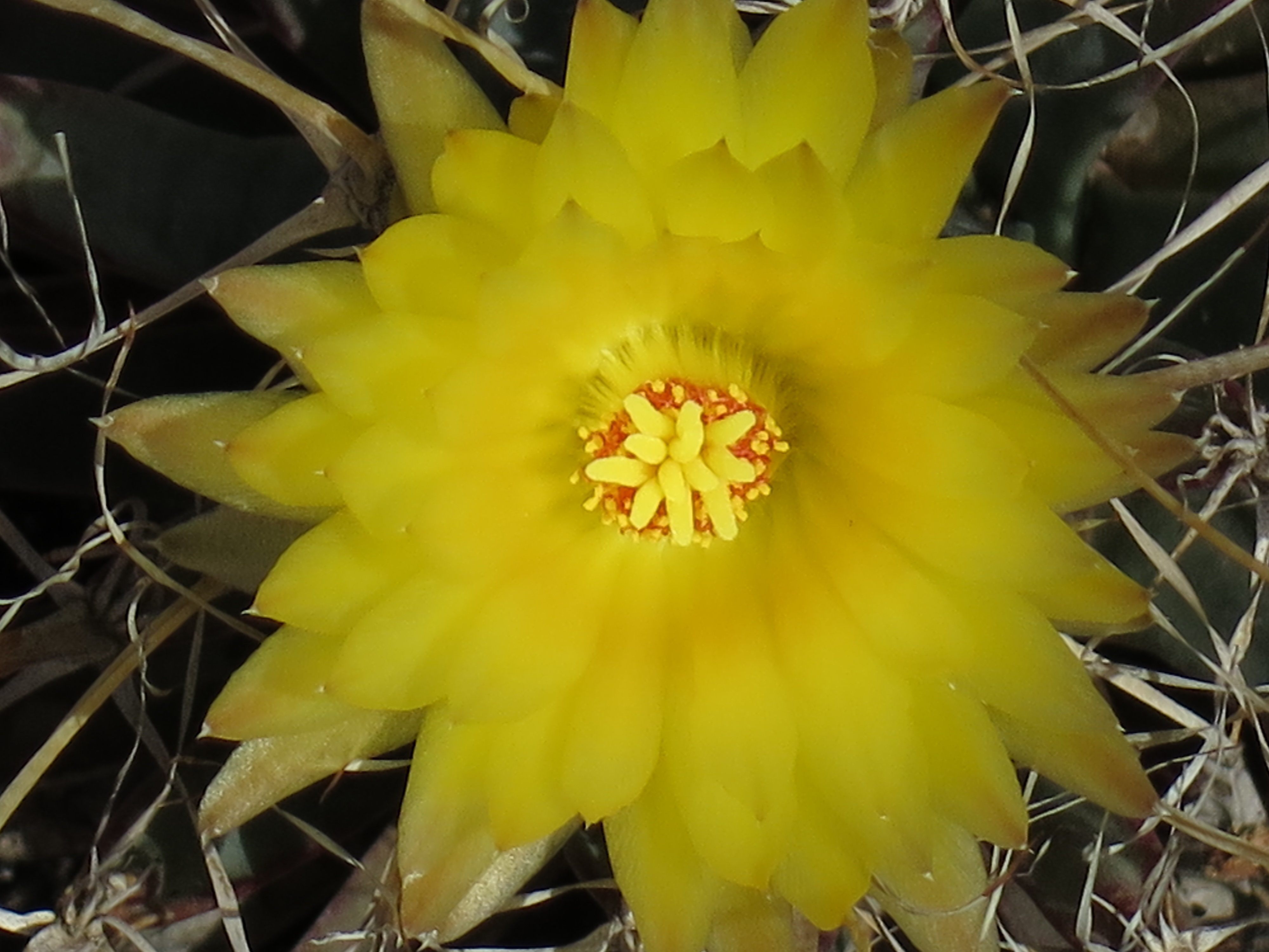 Il fiore della leuchtenbergia principis